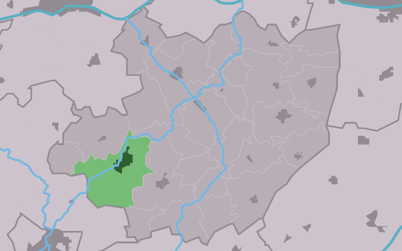 Kaartsje fan himrik fan Wommels